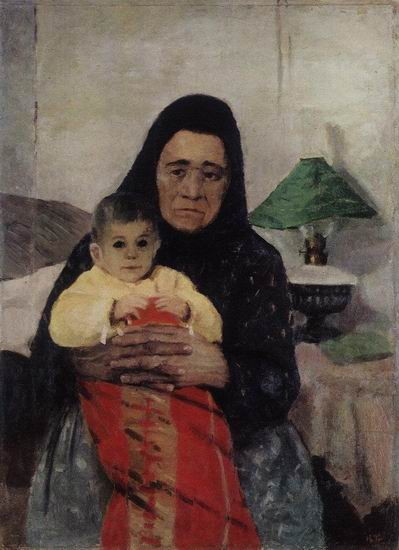 Nanny and Baby (Няня с ребенком), 1892